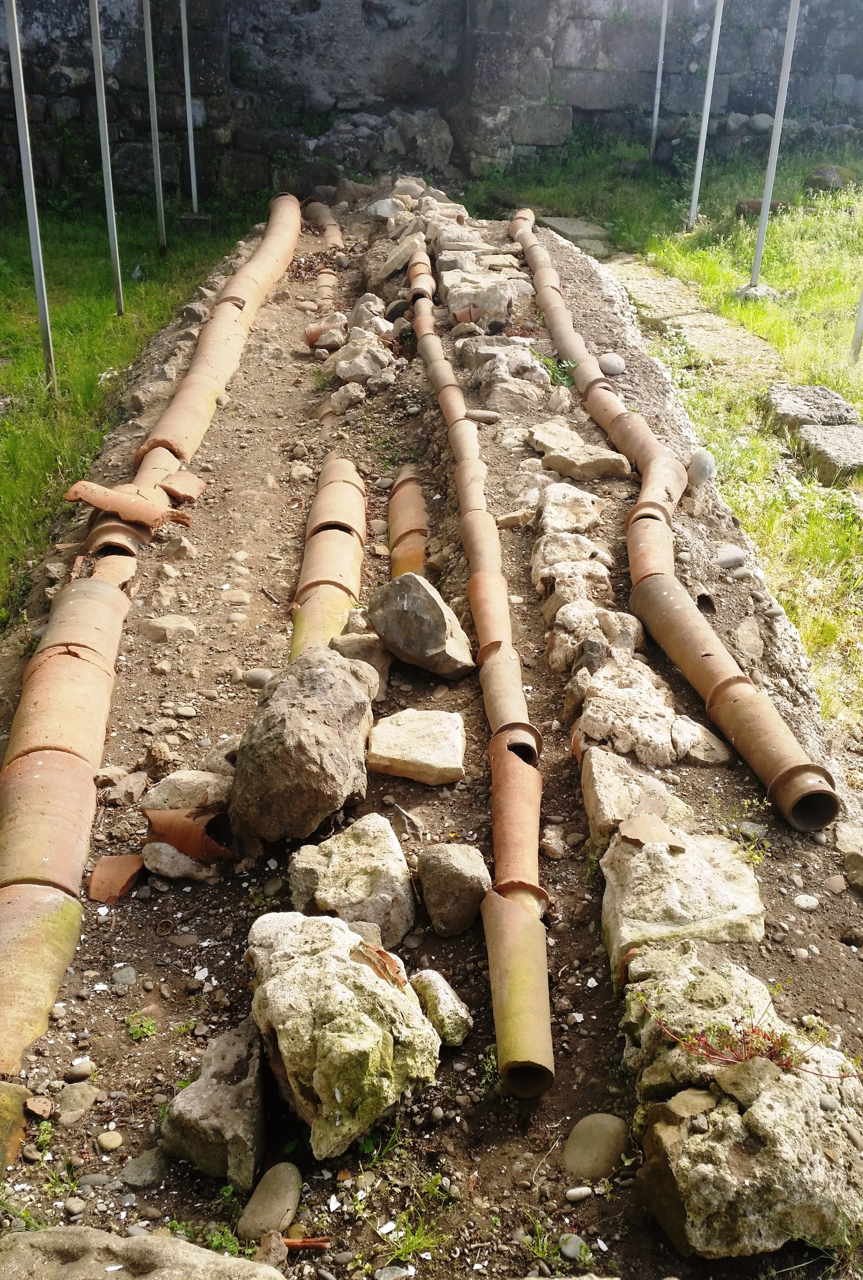 ანტიკური წყალგაყვანილობა გონიოს ციხეში